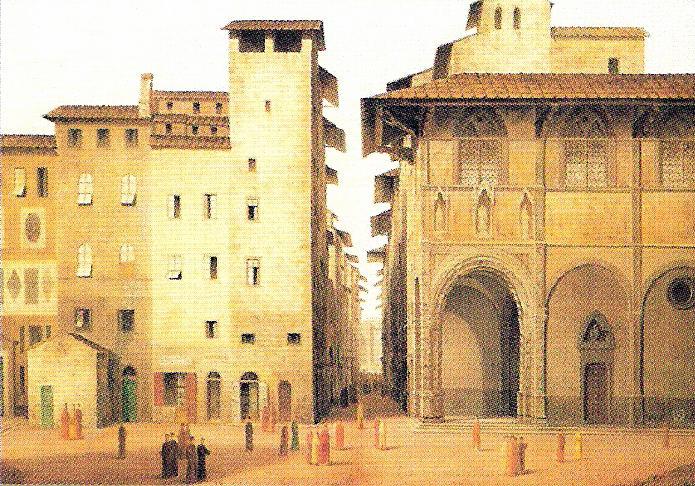 Corso degli Adimari, Loggia del Bigallo e piazza San Giovanni